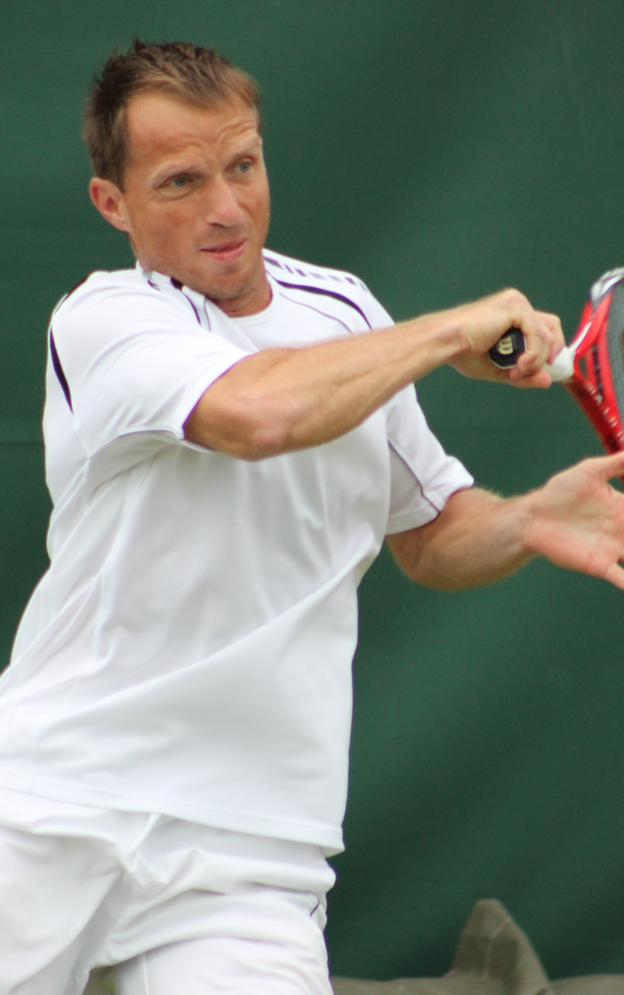 Pospisil J. WMQ14 (8)